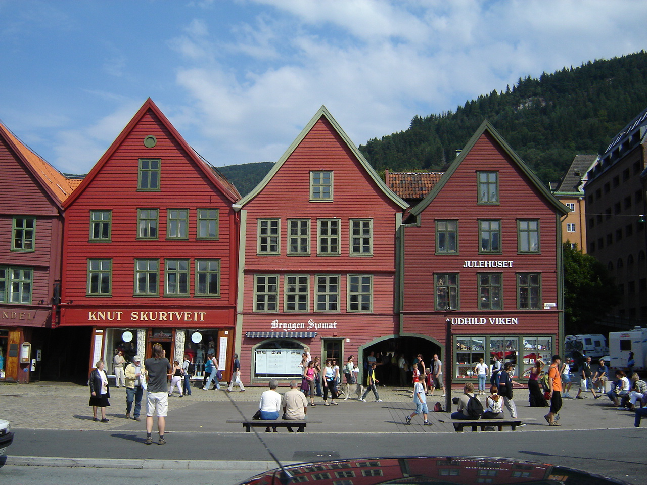 Bryggen in Bergen